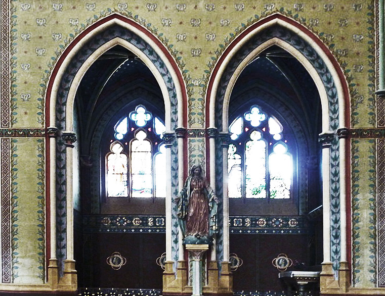 Kathedrale Nevers, Kapelle der Unbefleckten Empfängnis